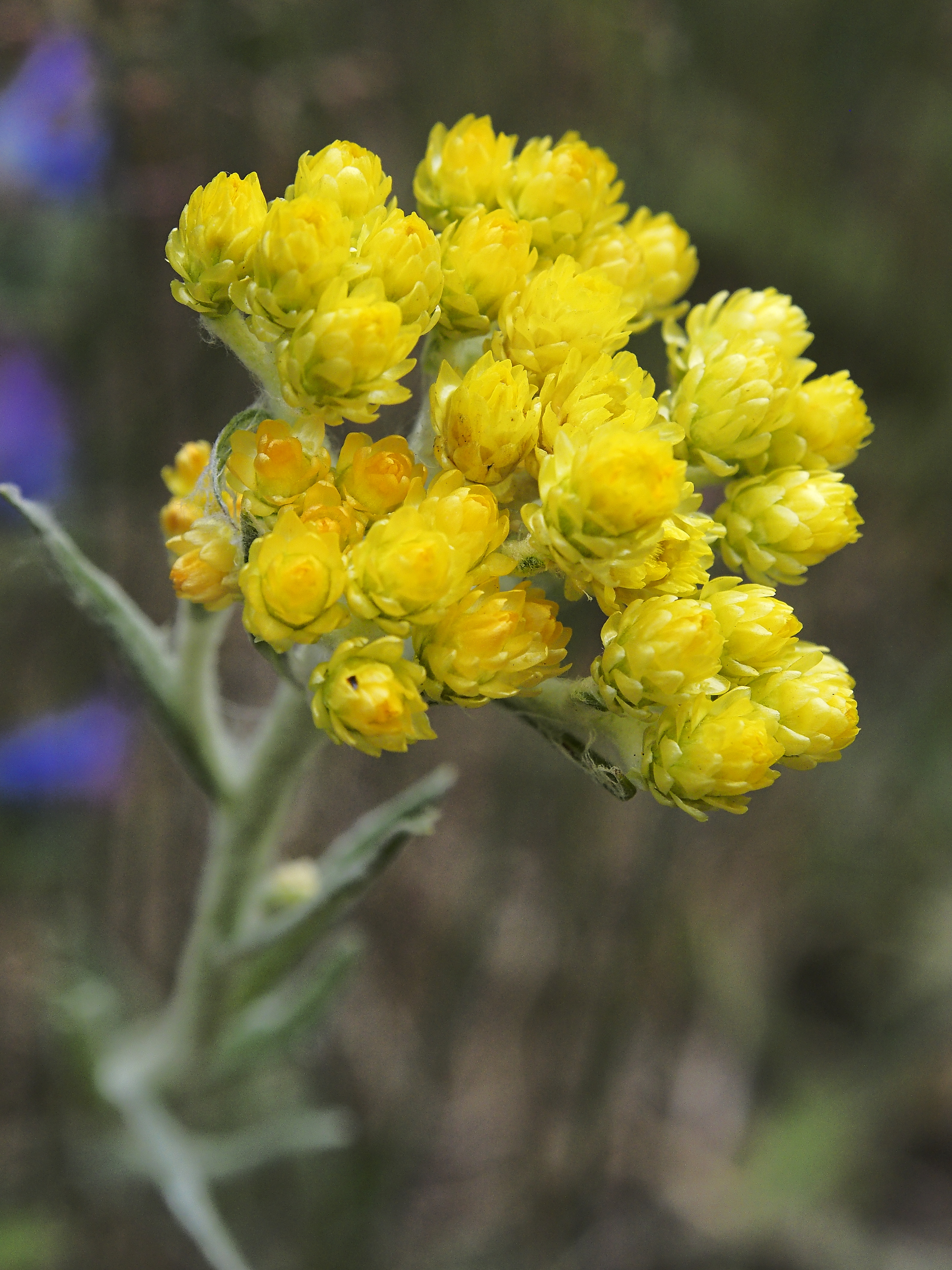 Blüte von Helichrysum arenarium, die Sand-Strohblume im Tegeler Fließ (FFH-Schutzgebiet DE-3346-301).